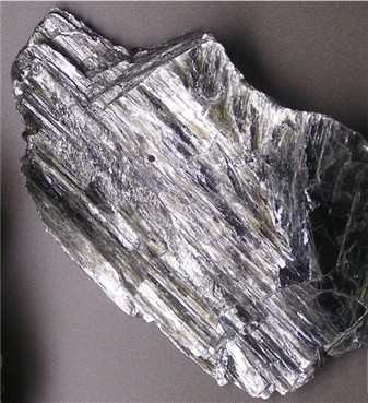 muscoviet (mica) eigen foto